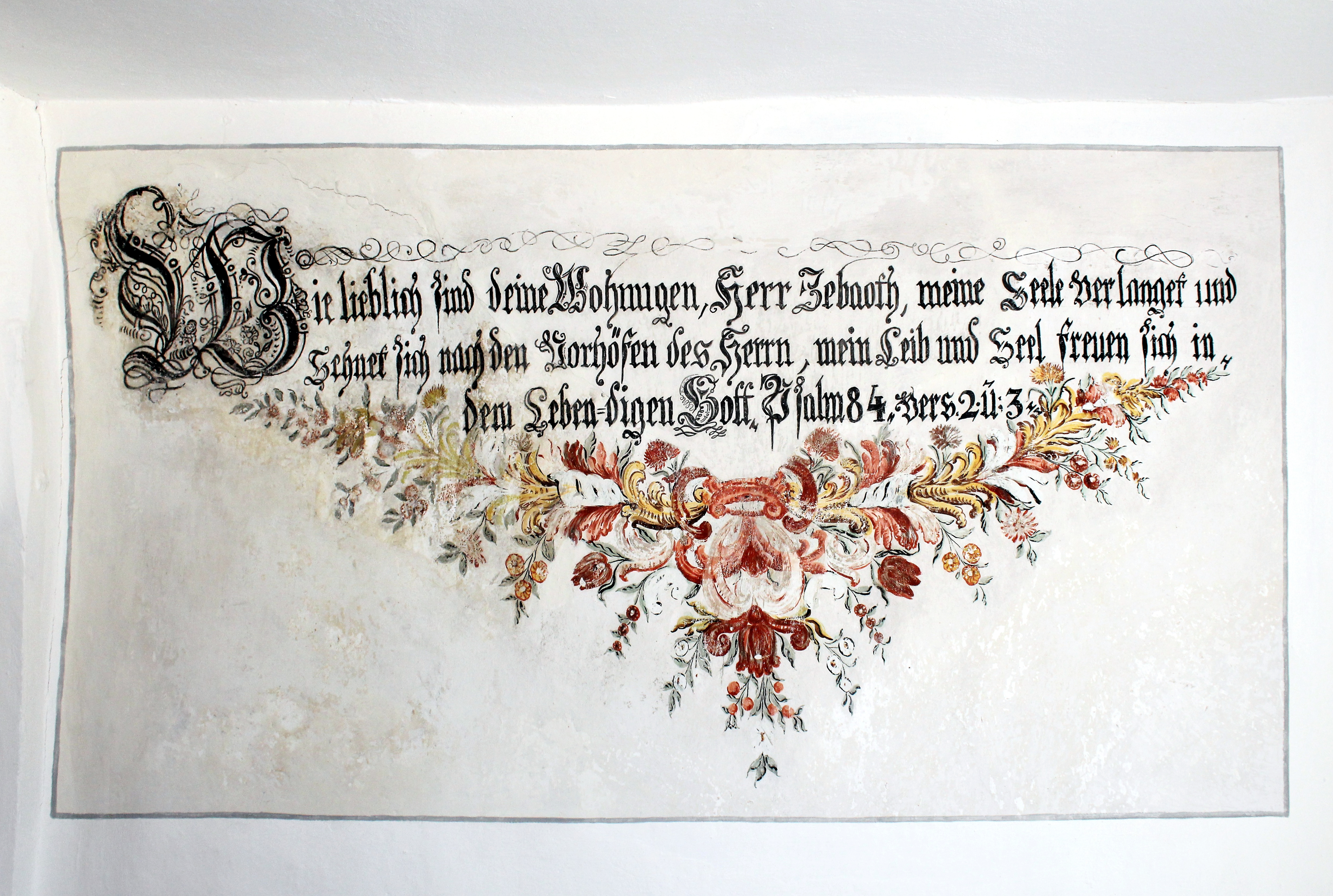 Evangelische Kirche Runzhausen (Gladenbach), Landkreis Marburg-Biedenkopf, Hessen, Deutschland